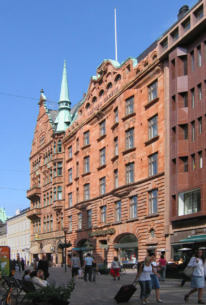 Bankbyggnad Malmö arkitekt Wickman